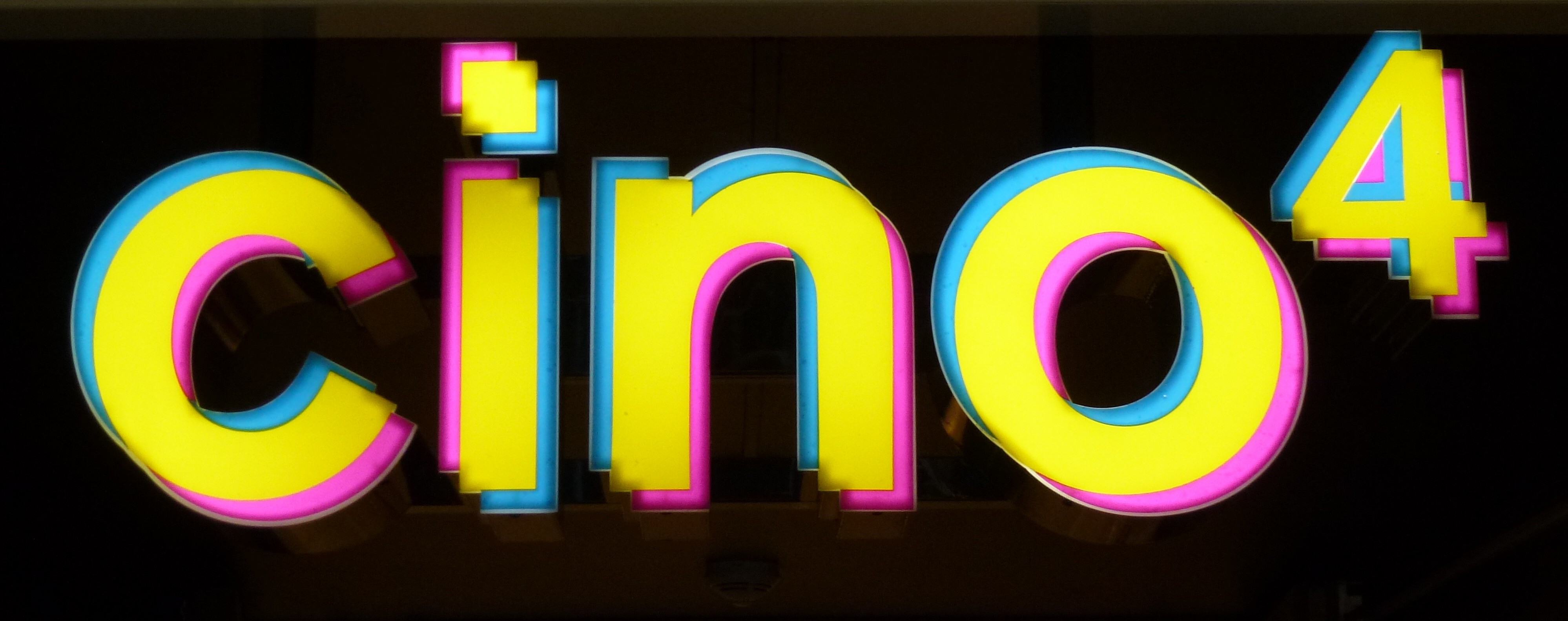 Lysskylt till cino4 på Tekniska Museet, Stockholm